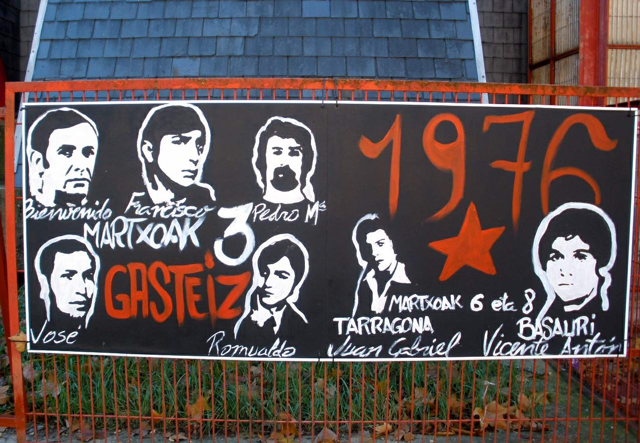 Parroquia de San Francisco de Asís, en Vitoria-Gasteiz